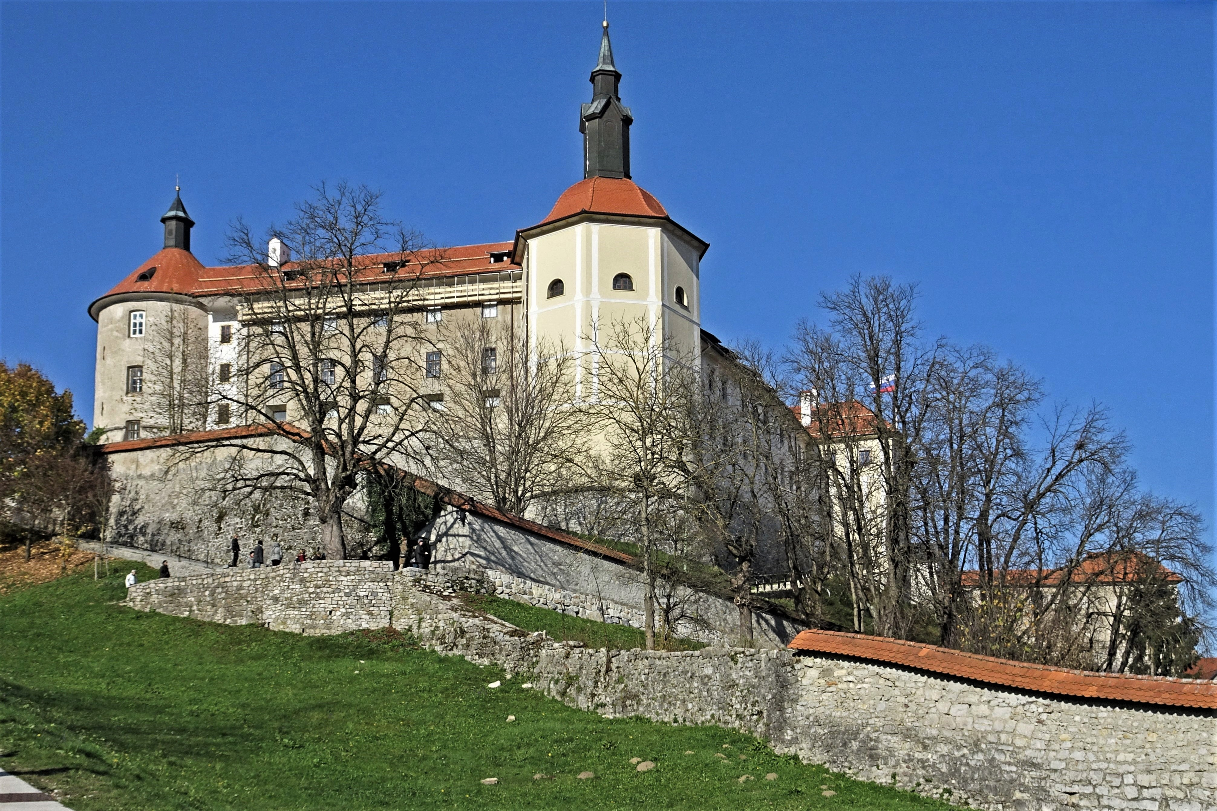 Skofja Loka, Südansicht des Schlosses